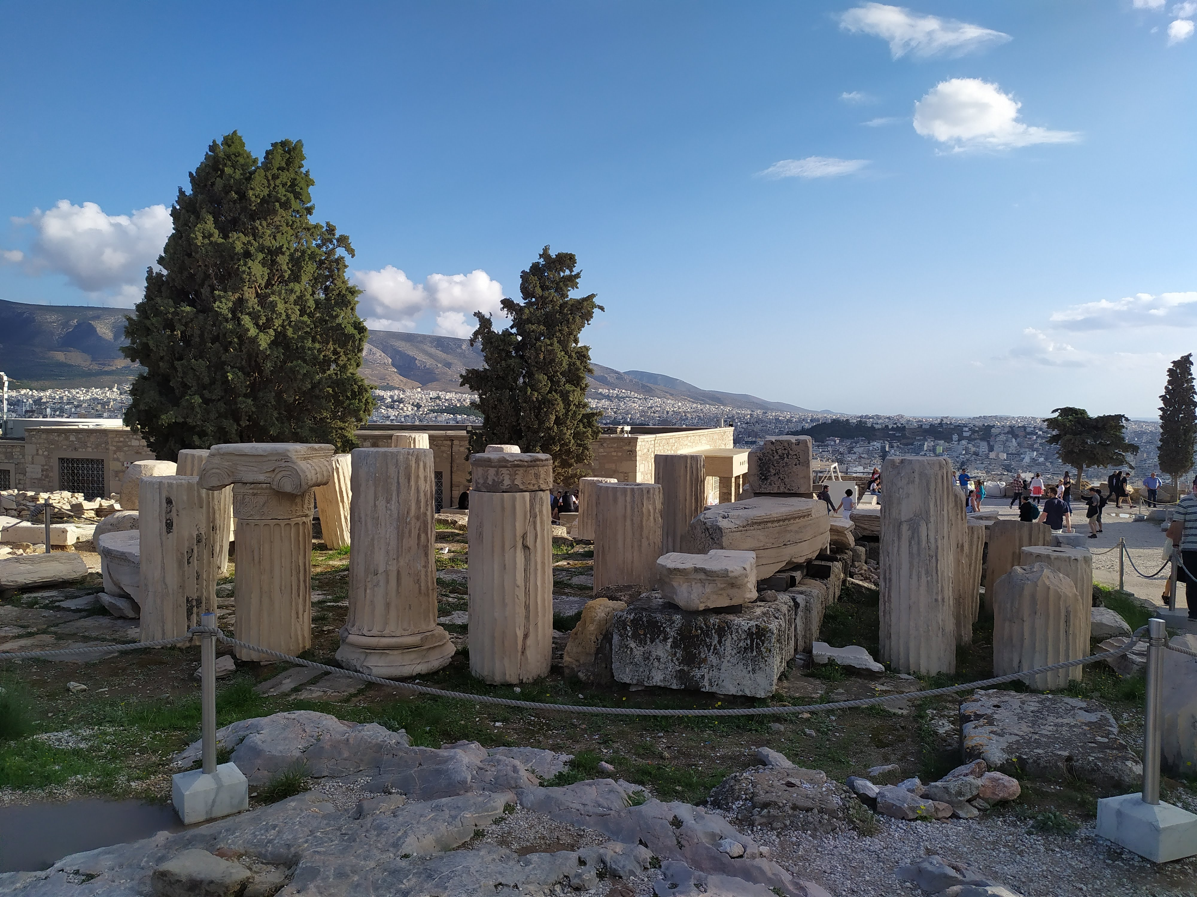 Vestige du temple grec de Rome et Auguste, sur l'Acropole à Athènes